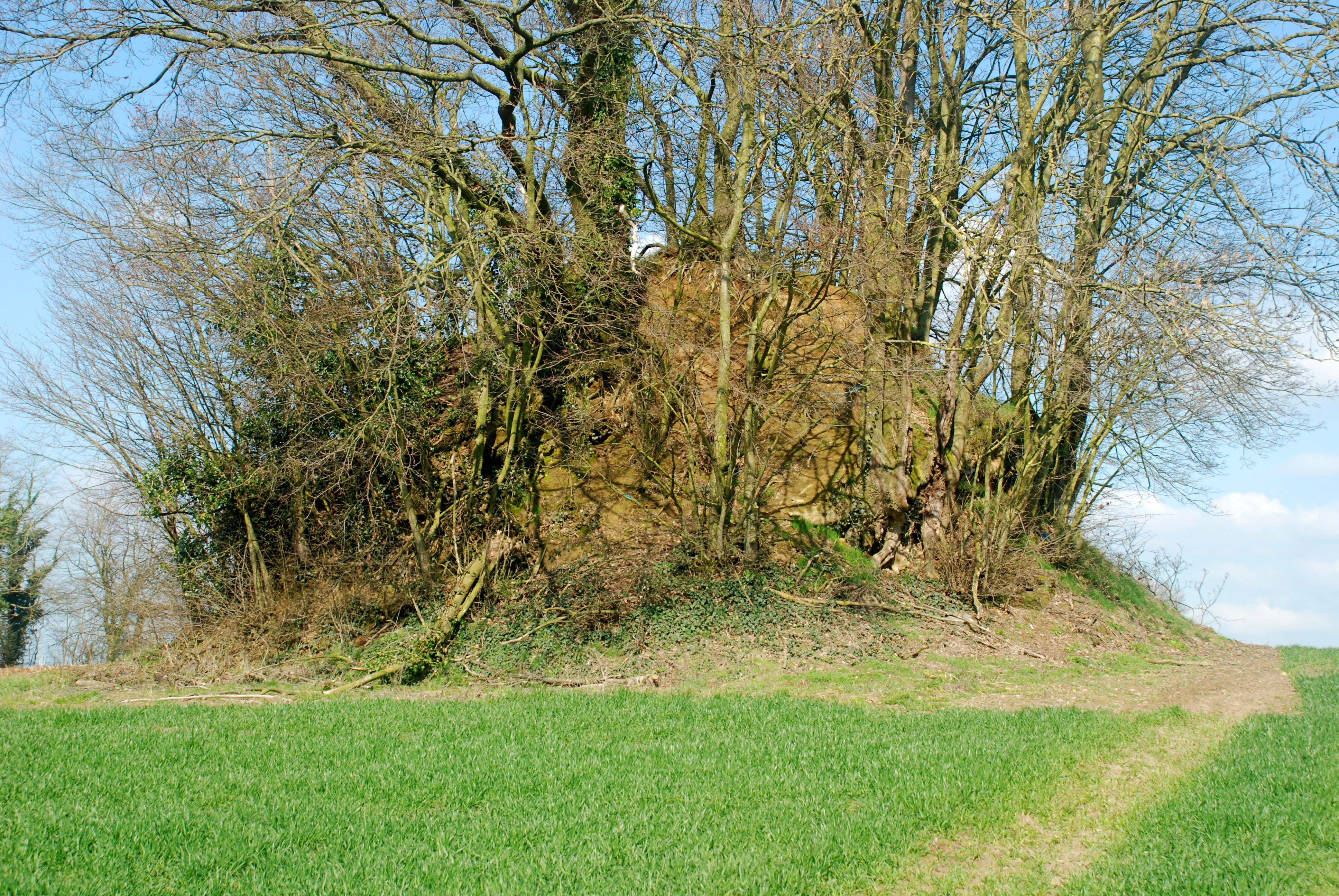 Belgique - Walhain - Tourinnes-Saint-Lambert - Tumuli de Libersart